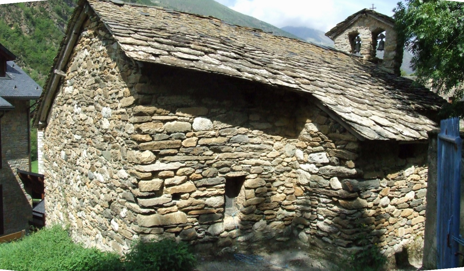 Sant Pere d'Aiguabella (la Torre de Cabdella, Pallars Jussà)